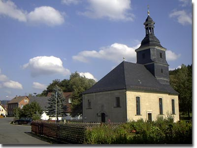 Außenansicht